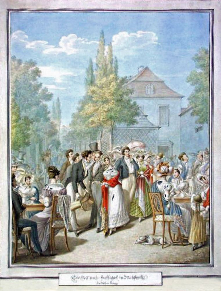 „Steifheit und Hoffahrt in Raschwitz“. Aquarell von Georg Emanuel Opiz (1775-1841)